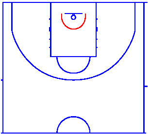 Półkole pod koszem